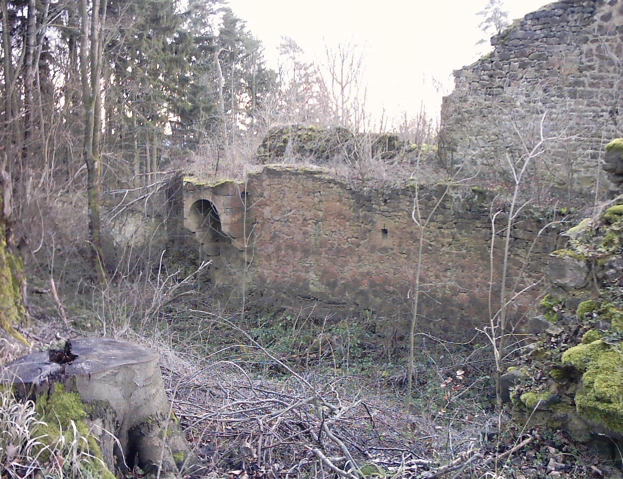 Der hussitenzeitliche Zwinger mit dem teilweise erhaltenen Schießerker